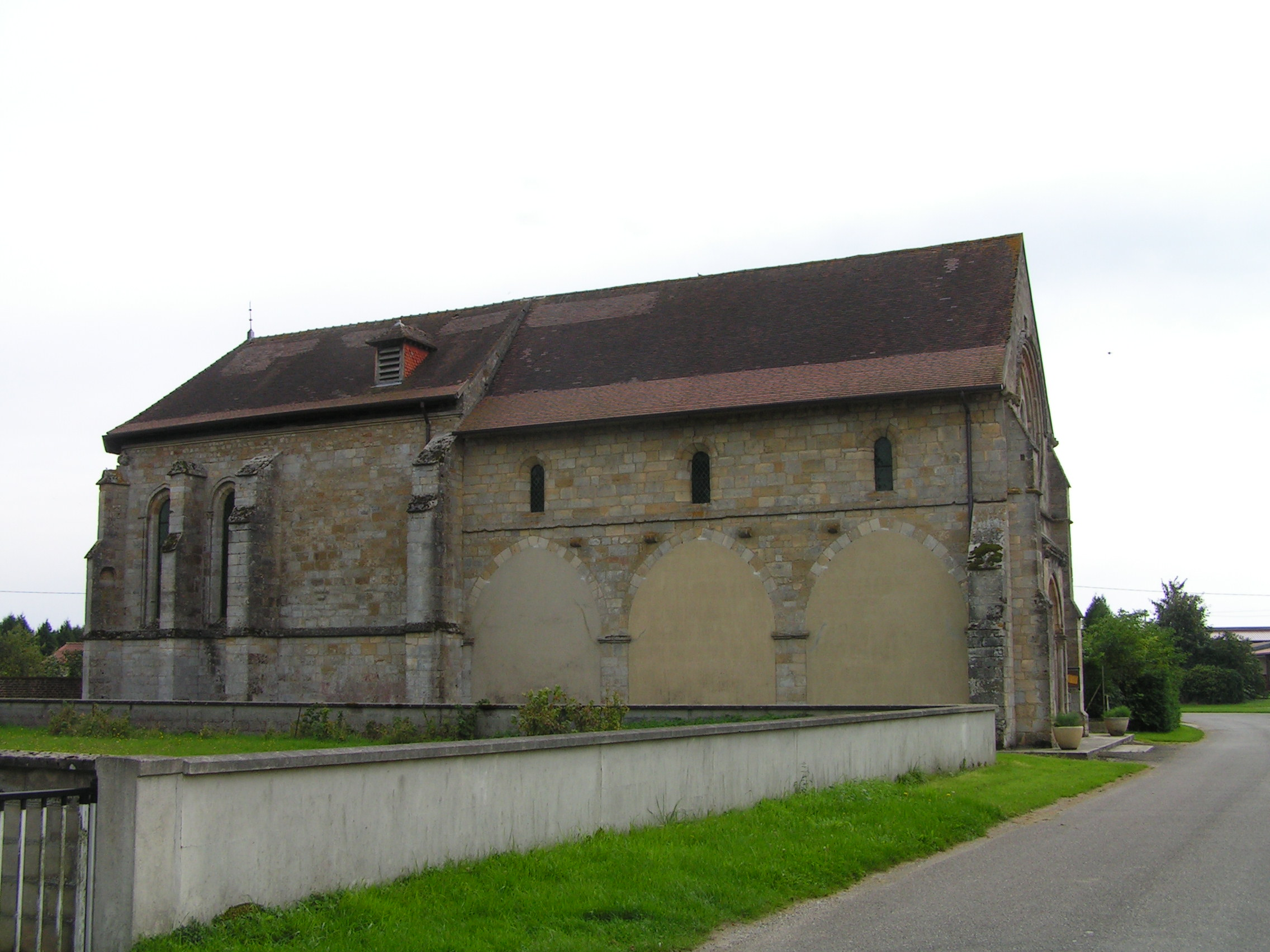 Église de l'Assomption d'Ambrières (Classé) .